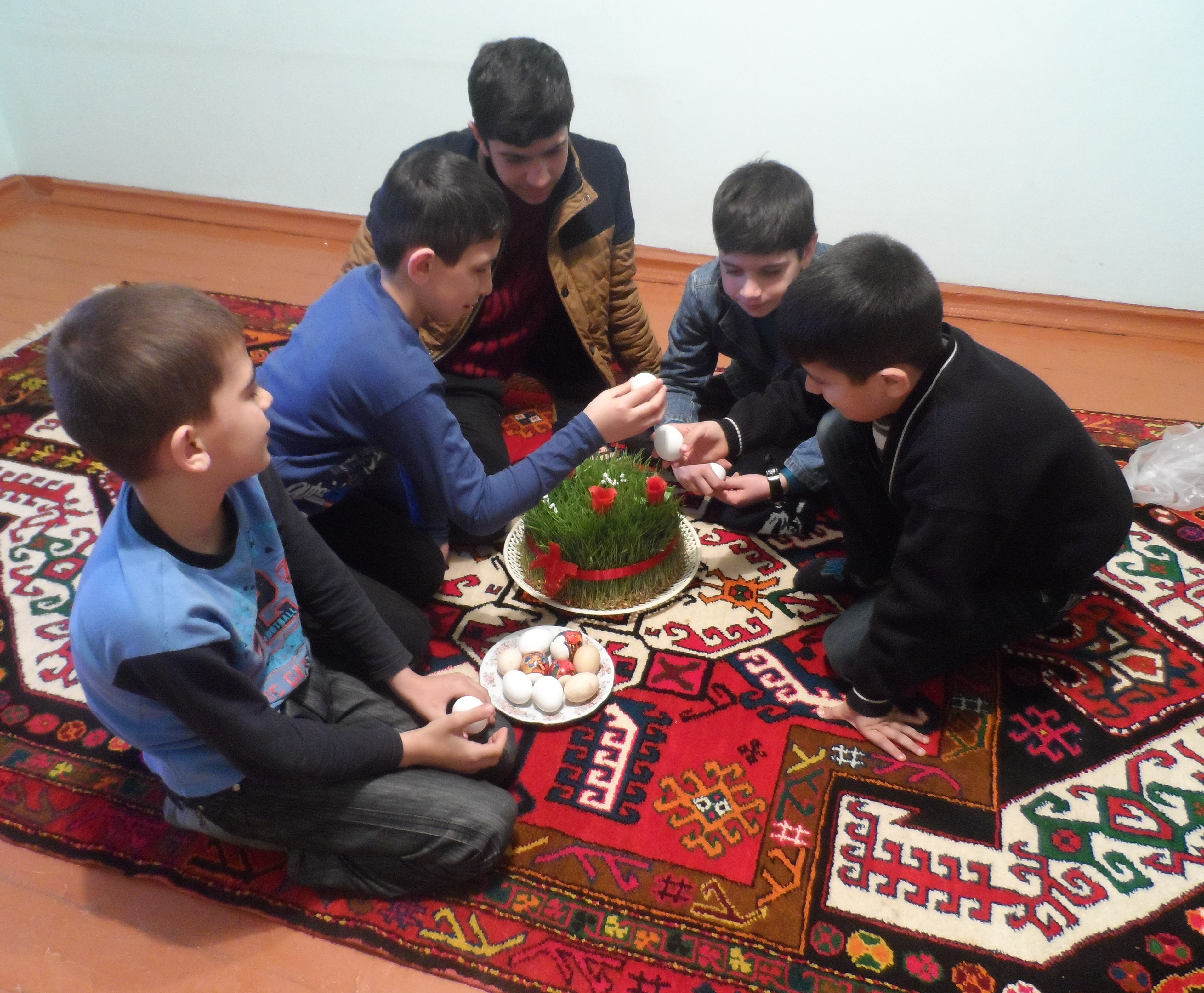 Yumurta döyüşdürmə - Azərbaycanda ən çox yazqabağı (Novruz bayramı) günlərdə əsasən uşaq və gənclər arasında, geniş şəkildə oynanılan qədim Novruz oyunlarından biridir.